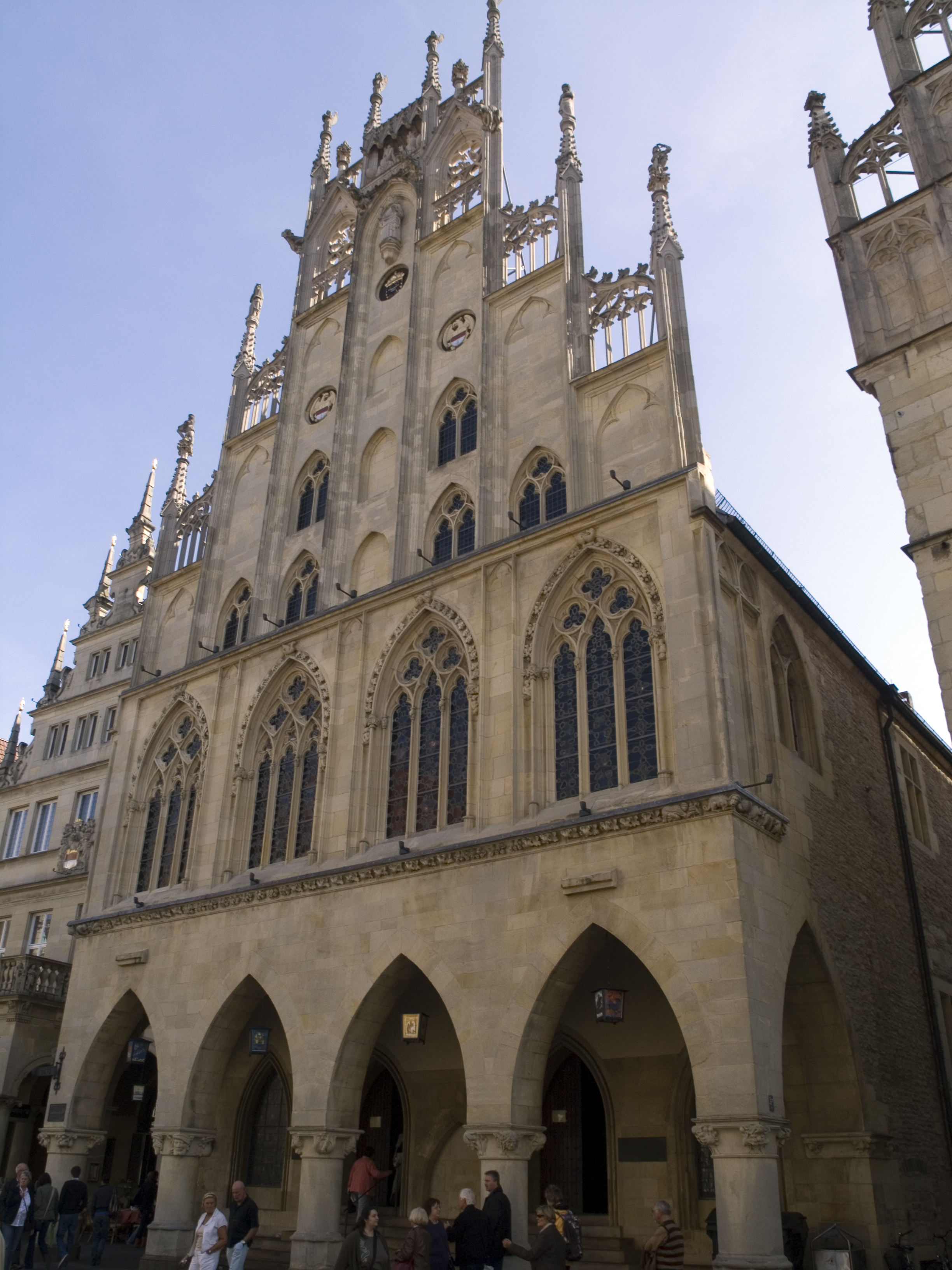 Северный Рейн - Вестфалия, Мюнстер - историческая ратуша